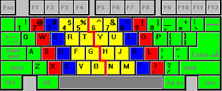 Qwerty